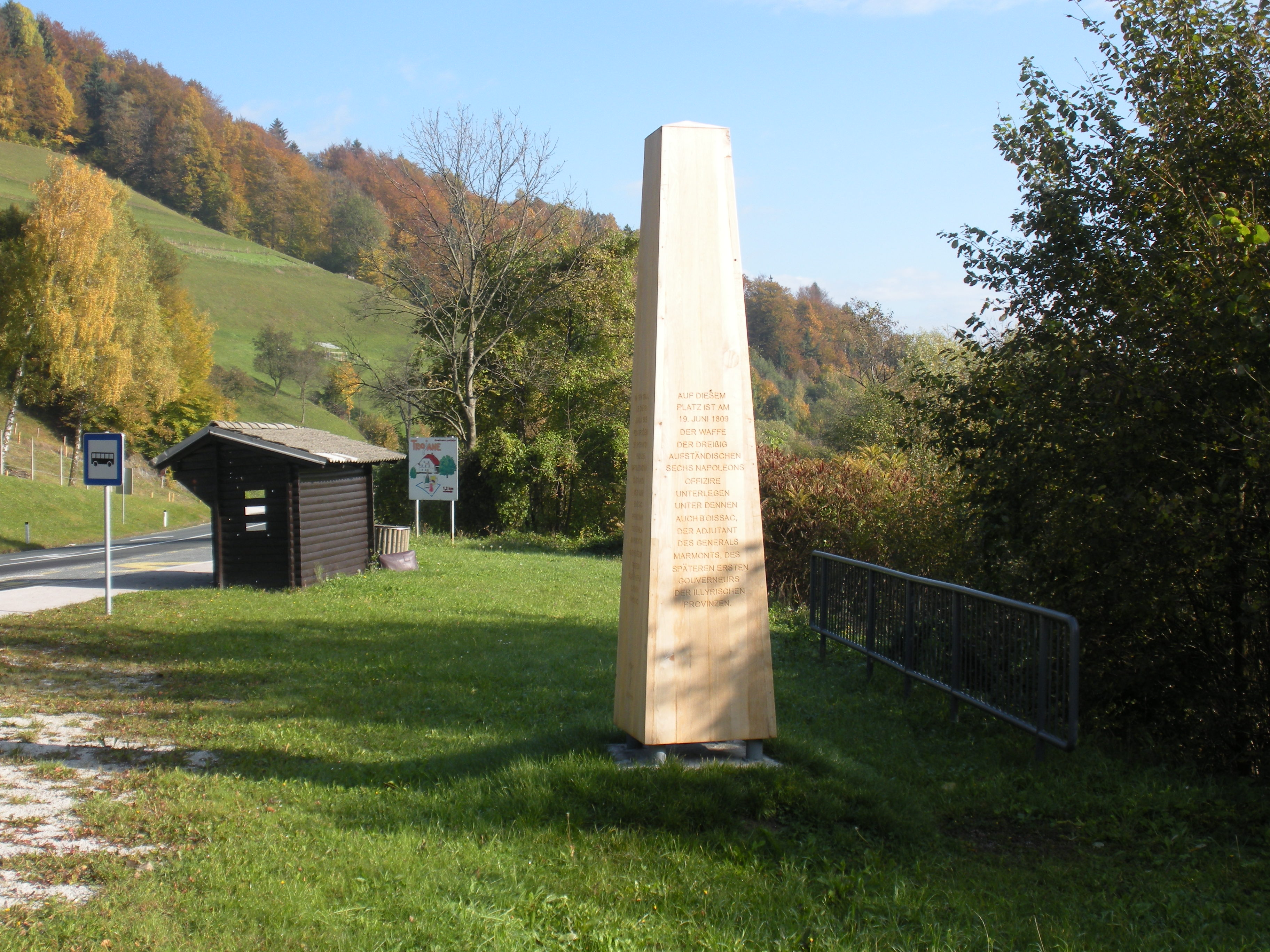 Spominski obelisk na prelazu Učak pri Trojanah postavljen ob dvestoletnici napada rokovnjačev na kolono Napoleonovih vojakov.